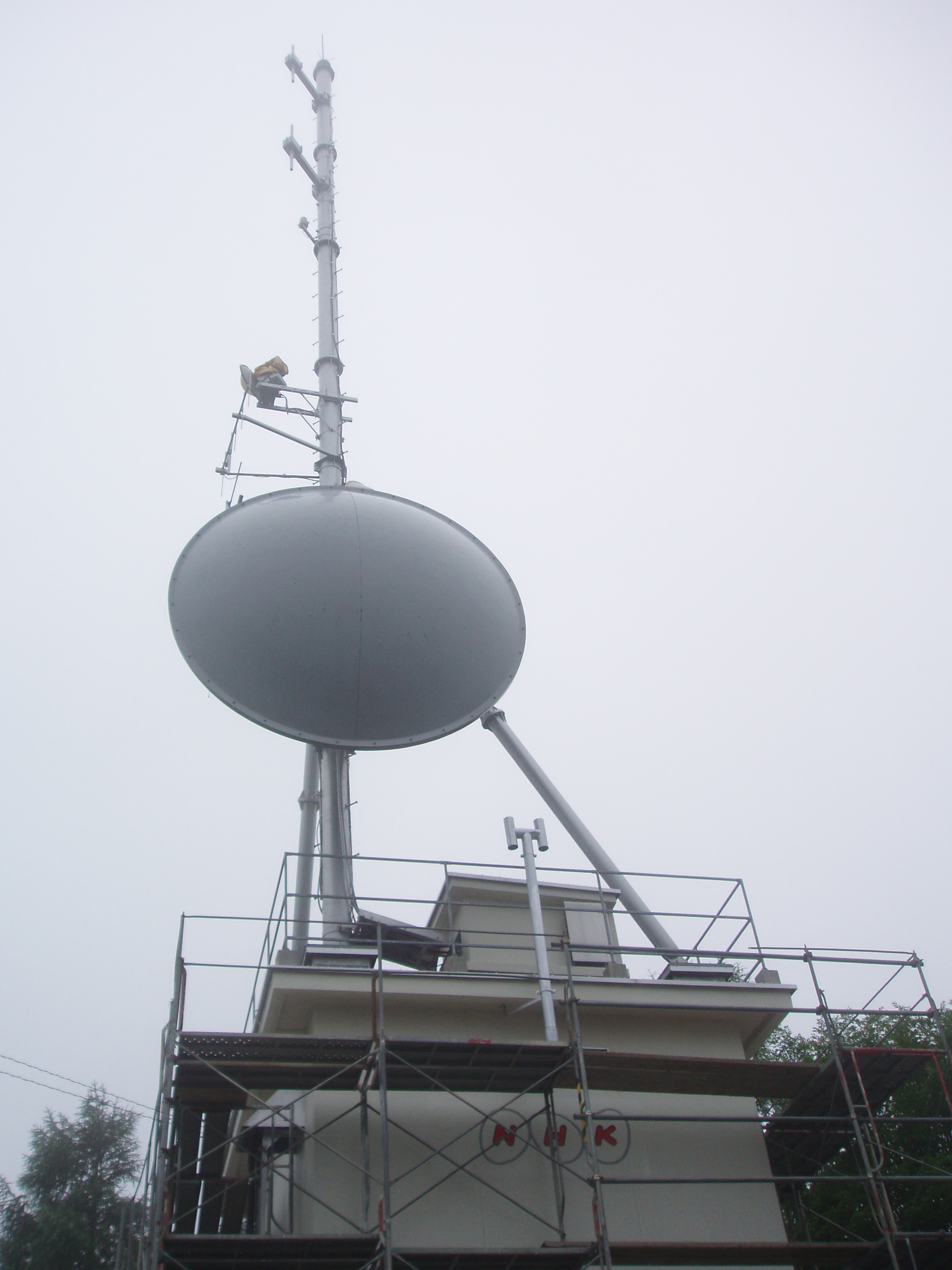 広尾中継局 NHK送信設備